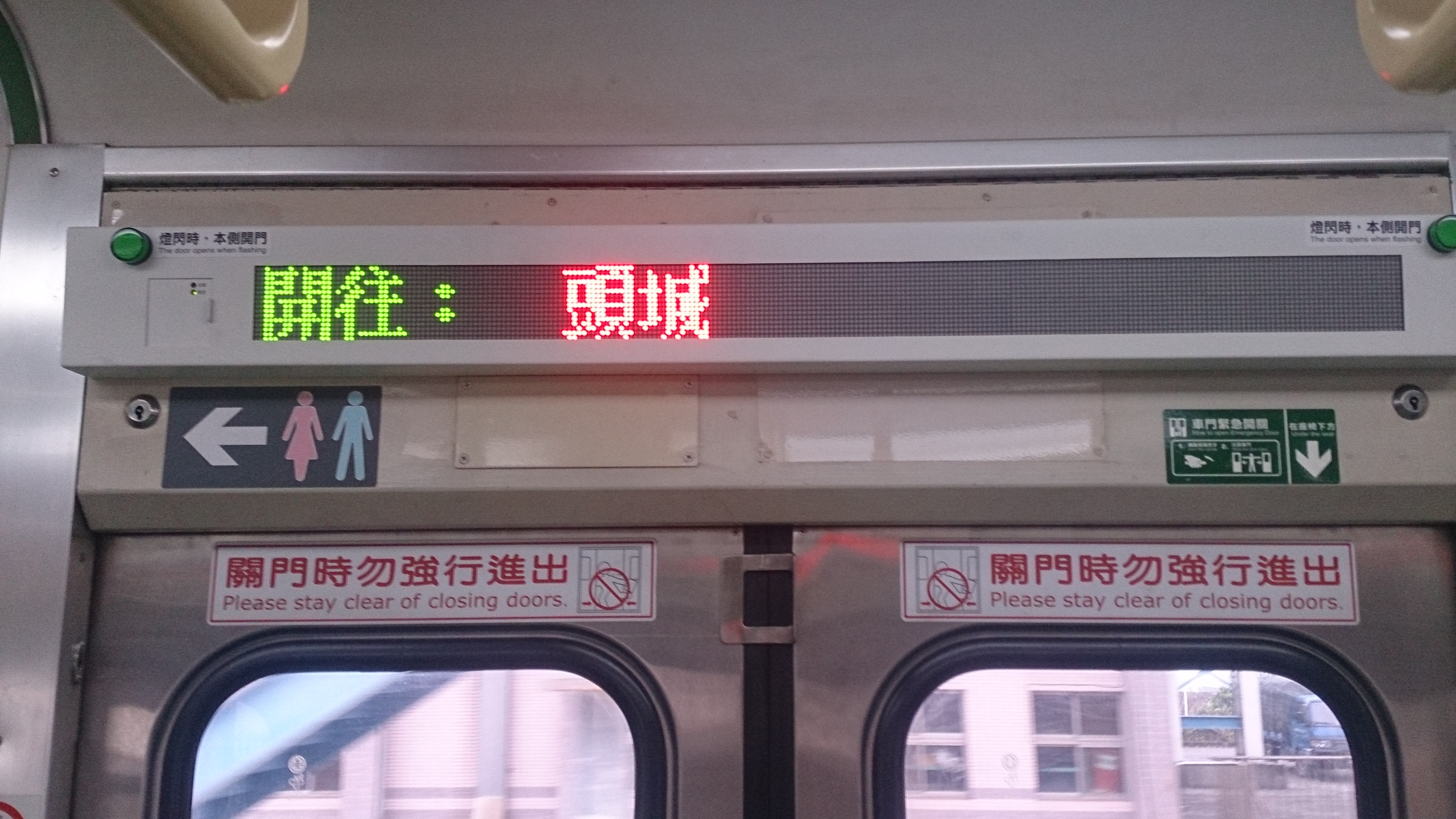 臺灣鐵路管理局EMU500型電聯車車門上方LED旅客資訊顯示器，部分終點站改成顯示「開往」二字加站名，不顯示「車站」二字。拍攝時顯示開往頭城車站。